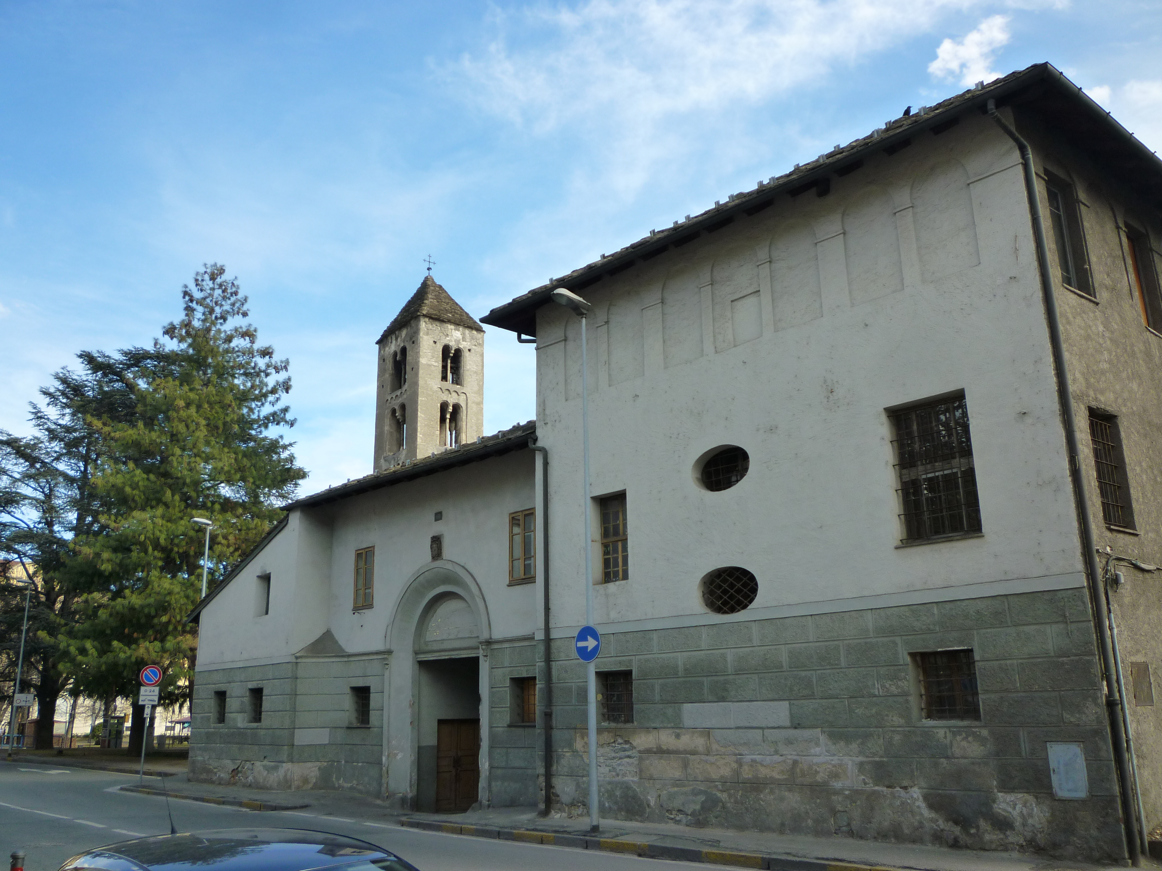 Le Collège Saint-Bénin - rue Jean-Baptiste Festaz à Aoste